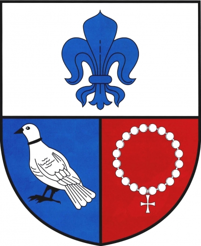 znak,Podolí , okres Žďár nad Sázavou